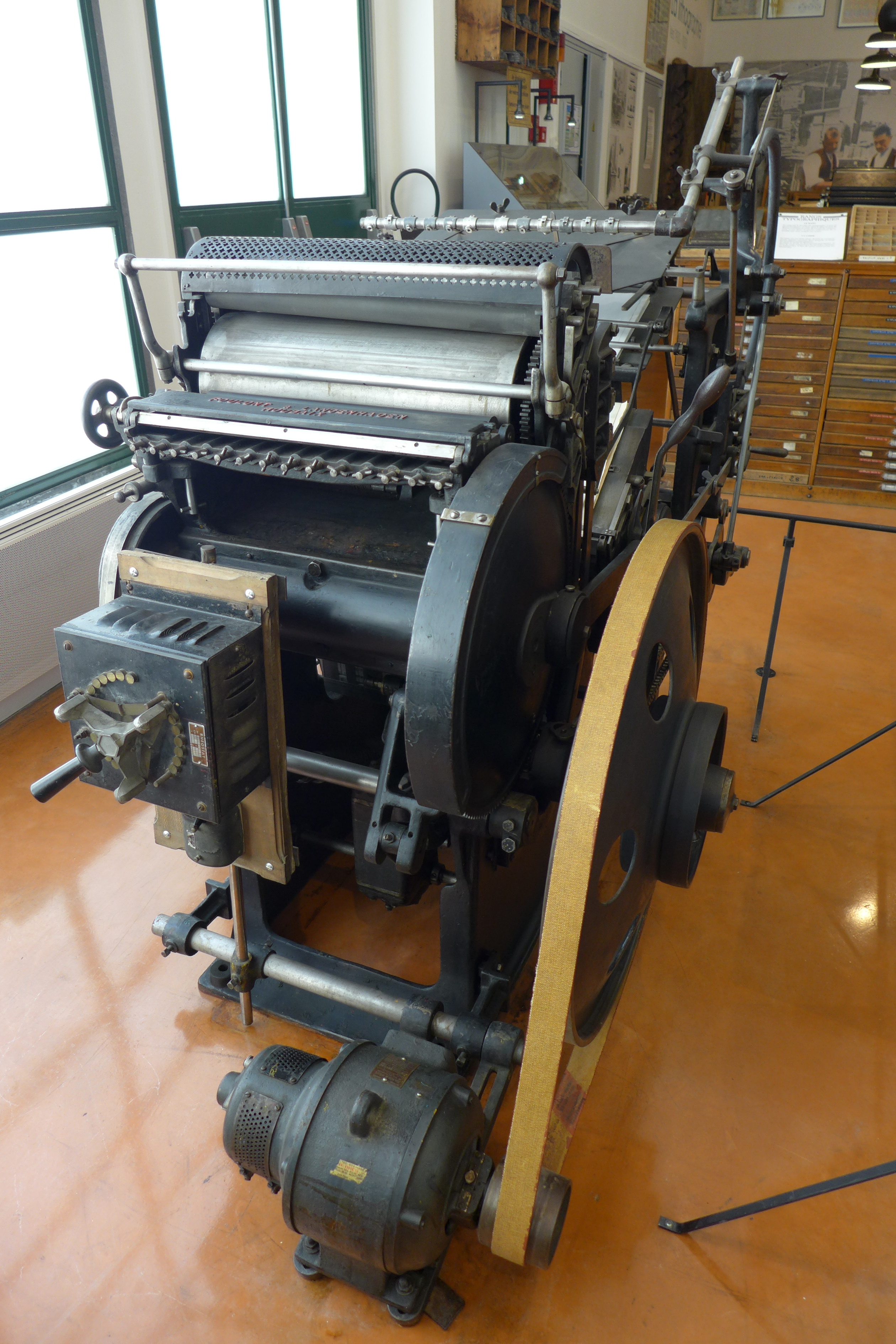 Exposition de matériel de cartonnage et d'imprimerie dans le Musée du cartonnage et de l'imprimerie de Valréas dans le Vaucluse - France.